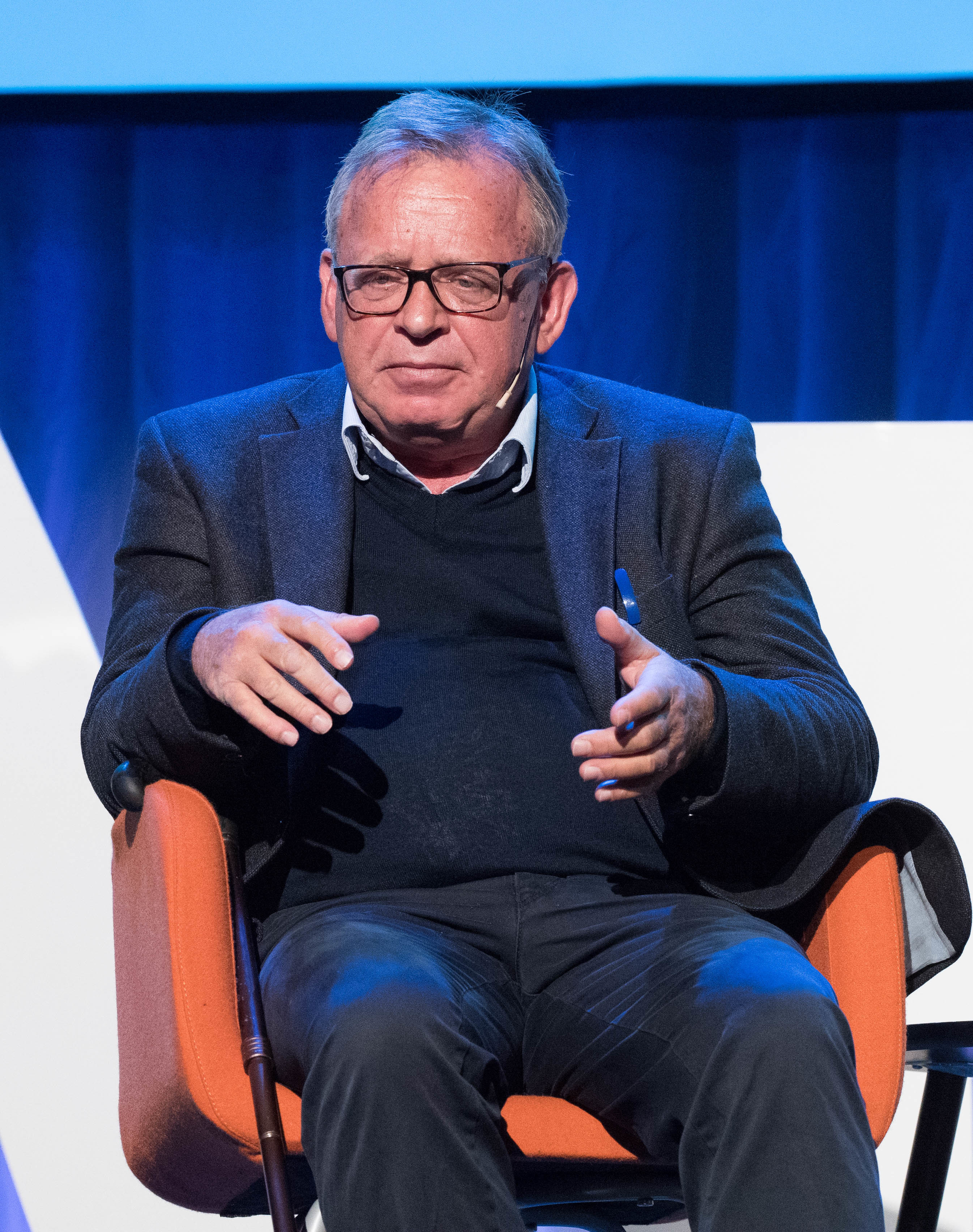 NMD Frank Årebrotsamtalen Medvirkende: Jostein Gripsrud, Shabana Rehmann Gaarder, Erna Solberg, Terje Tvedt. Moderator: Trine Eilertsen.